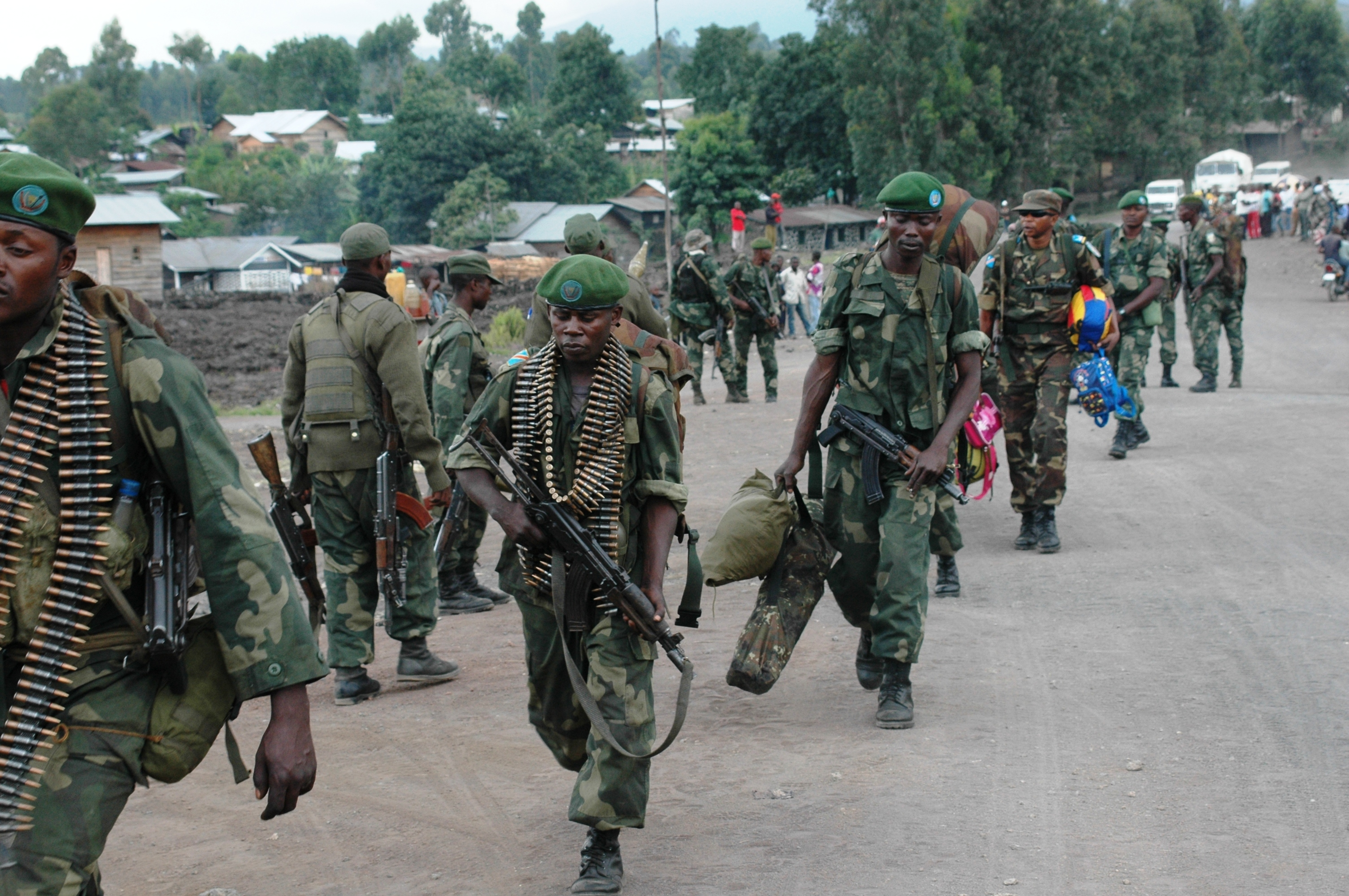 Les Forces armées nationales (FARDC) renforcent leurs positions autour de Goma après un deuxième jour (21 mai 2013) de combats entre eux et des éléments du M23 dans la localité de Mutaho à une dizaine de kilomètres de Goma. © MONUSCO/Clara Padovan